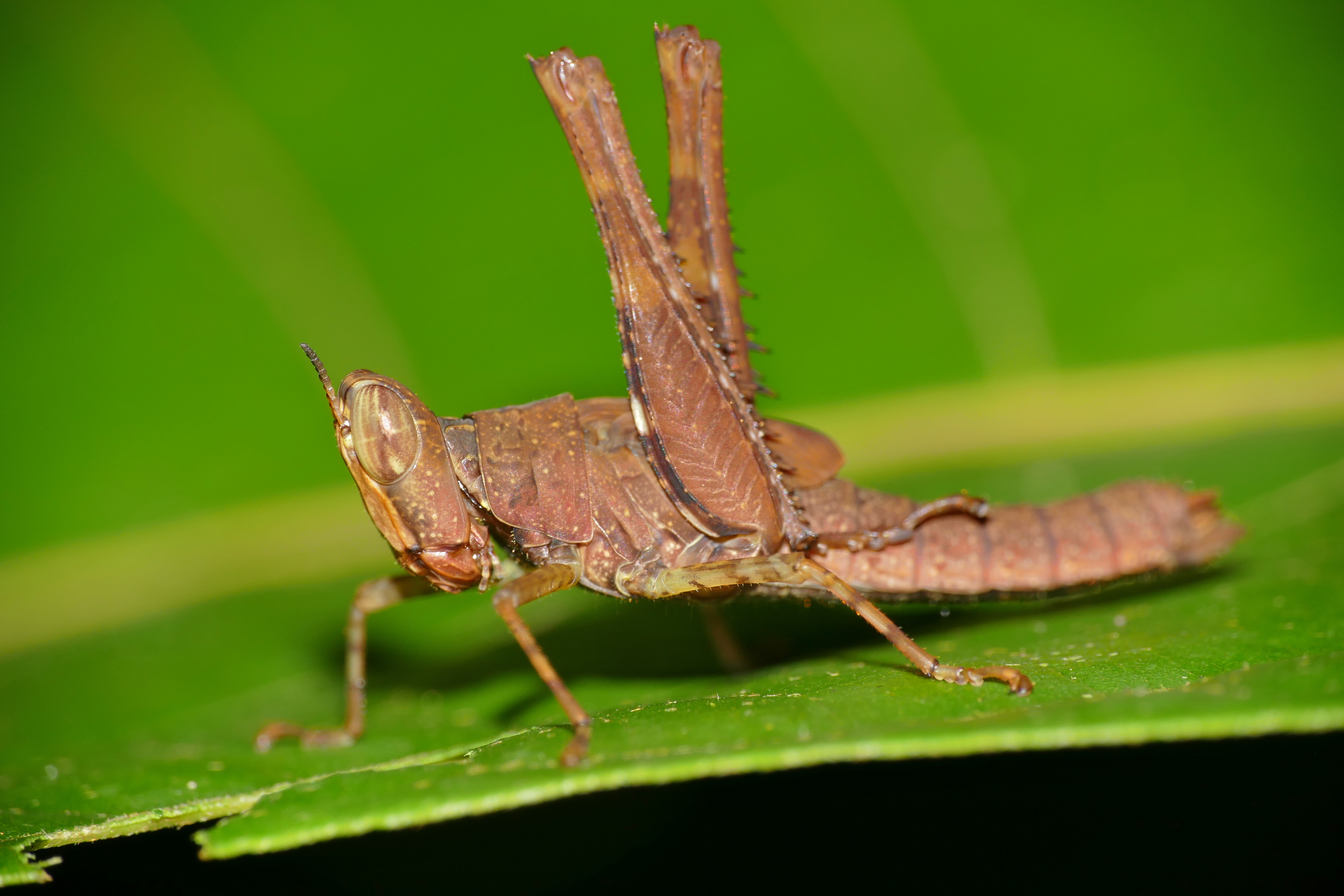 Mulu NP, Sarawak, MALAYSIA